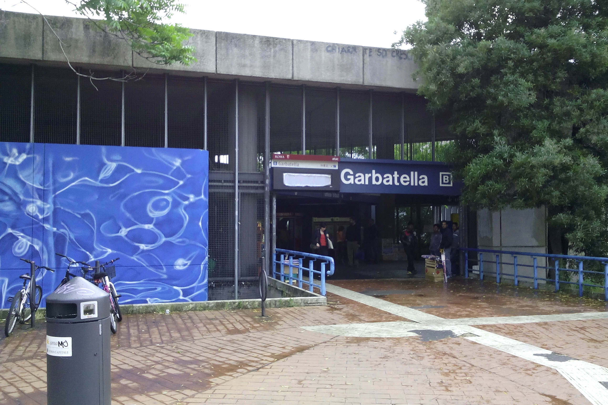 Entrance of Garbatella Metro B station in Rome